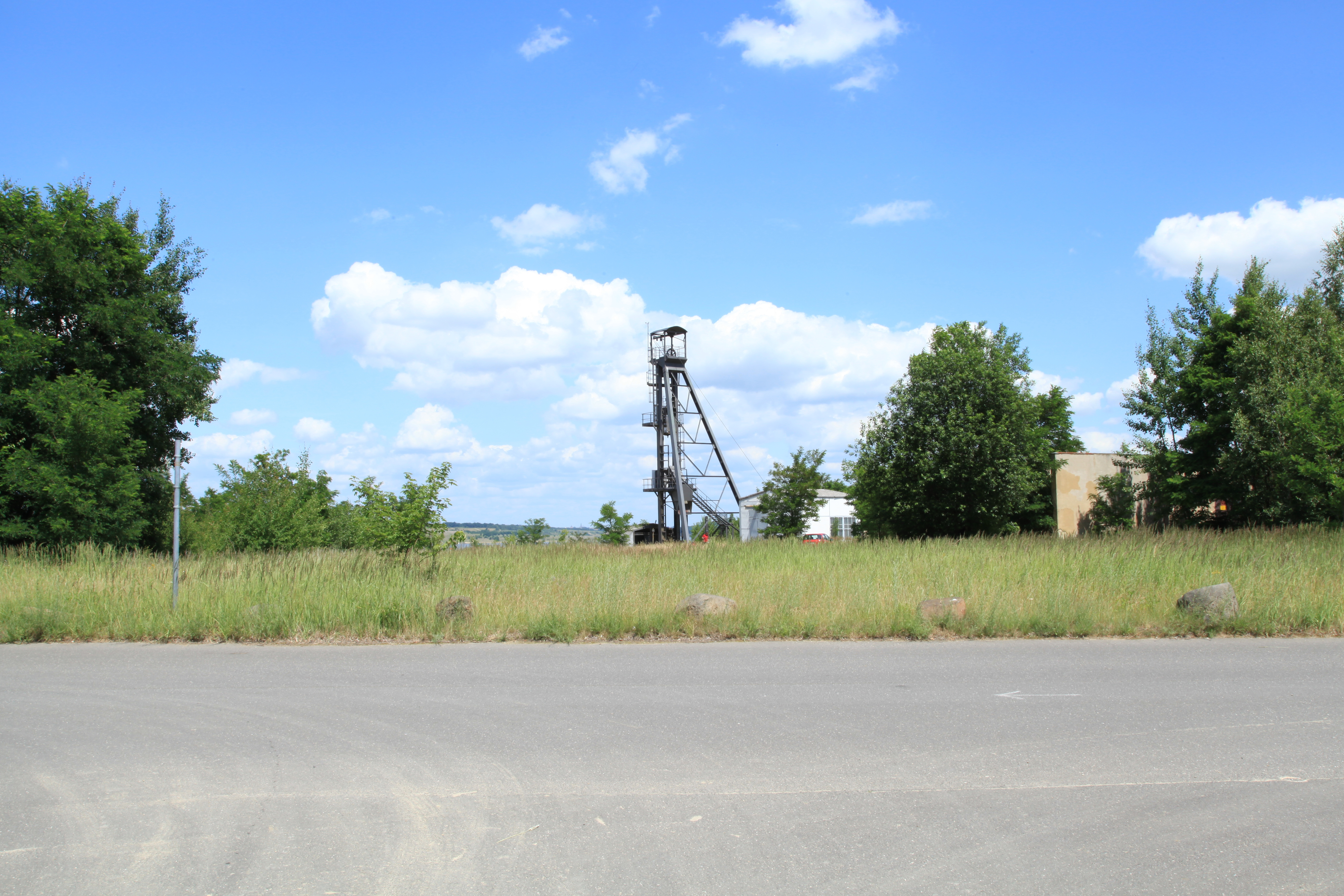 Skipschacht des Braunkohlebergbaus am jetzigen Berzdorfer See, Lorenzstraße in Tauchritz, Görlitz